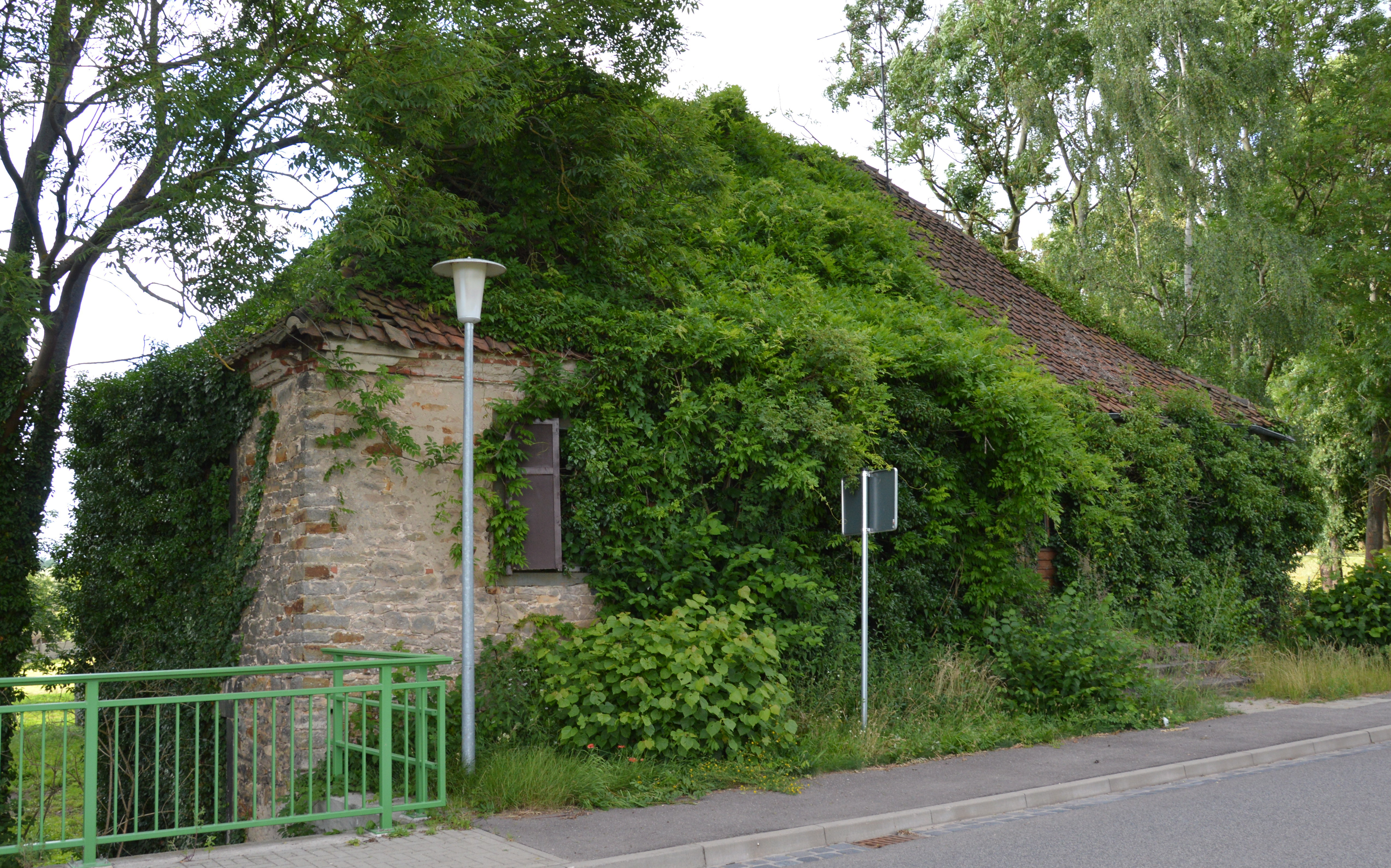 Dorfstraße (Groß Bartensleben) Mühle